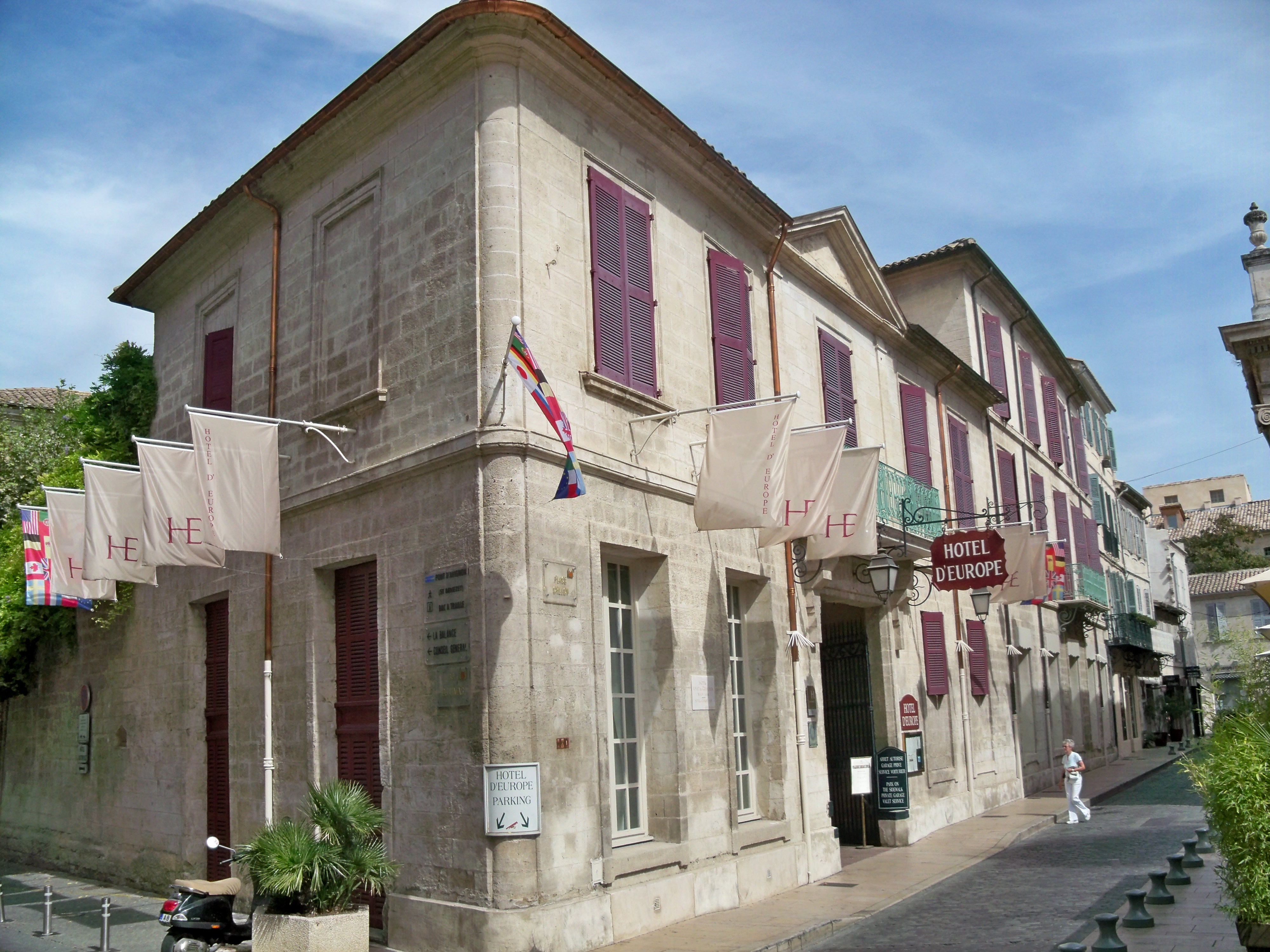 Hôtel Amat de Graveson (ancien hôtel particulier d'Avignon, Vaucluse), actuellement hotel touristique de l'Europe.